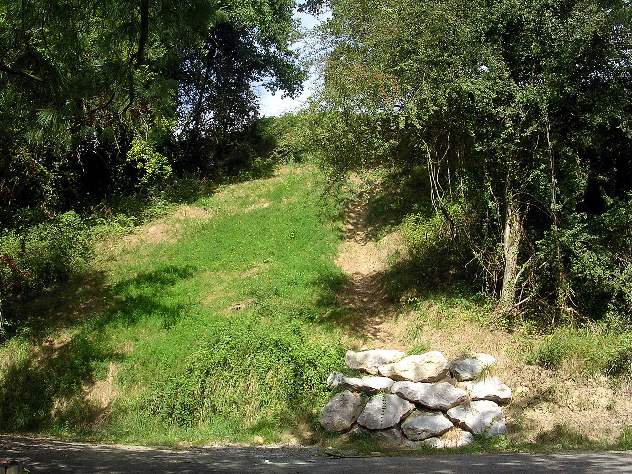 Oppidum de Lescar, dans le département français des Pyrénées-Atlantiques. Photo prise au pied de l'oppidum, depuis la rue de l'oppidum.